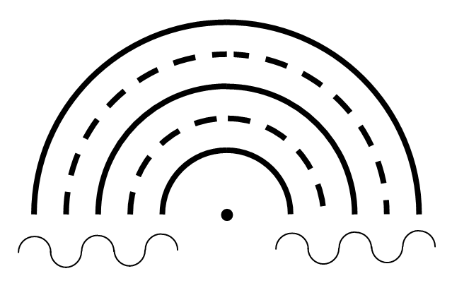 Golffronten